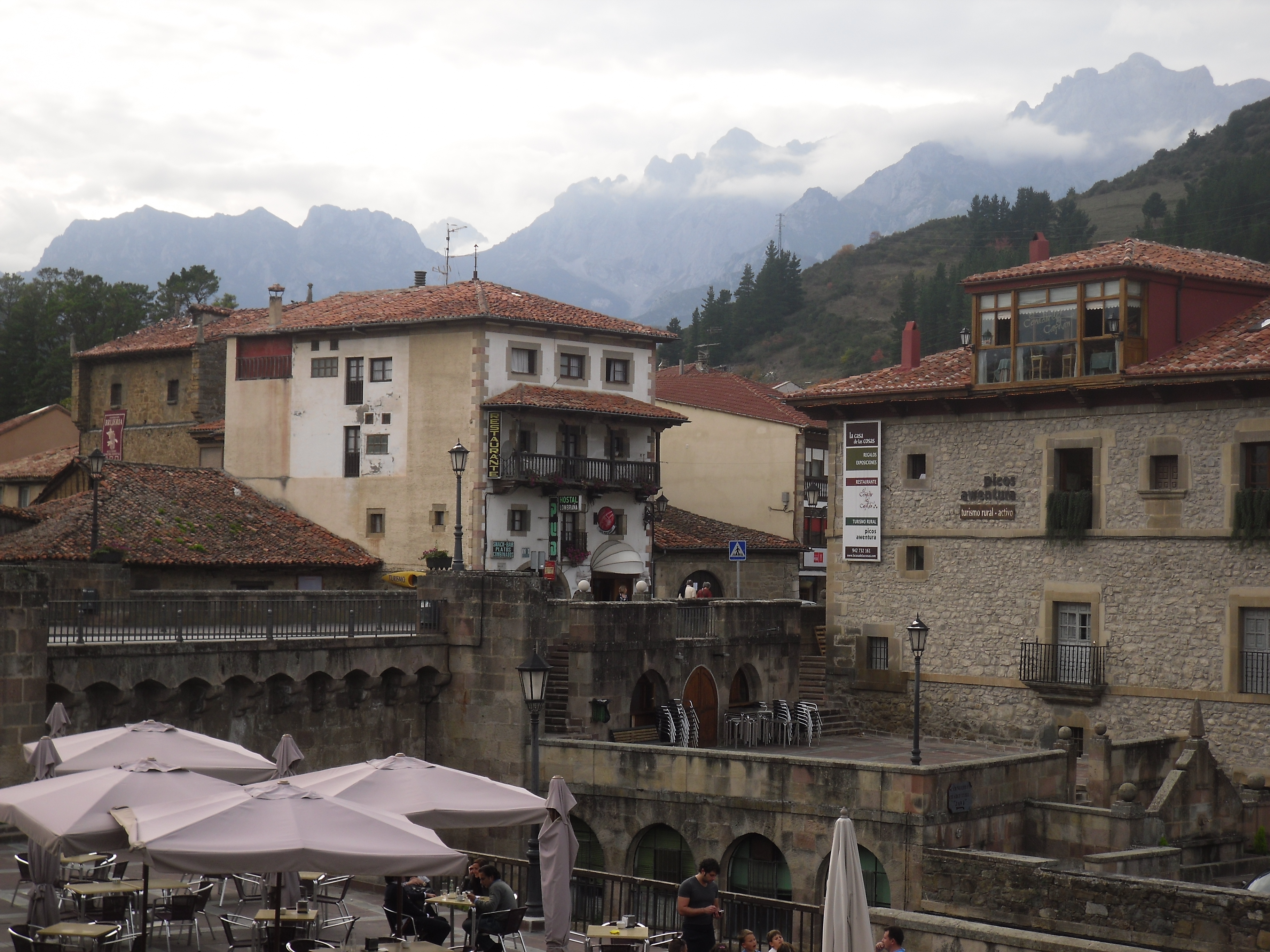 Vista panorámica de Potes (Cantabria)